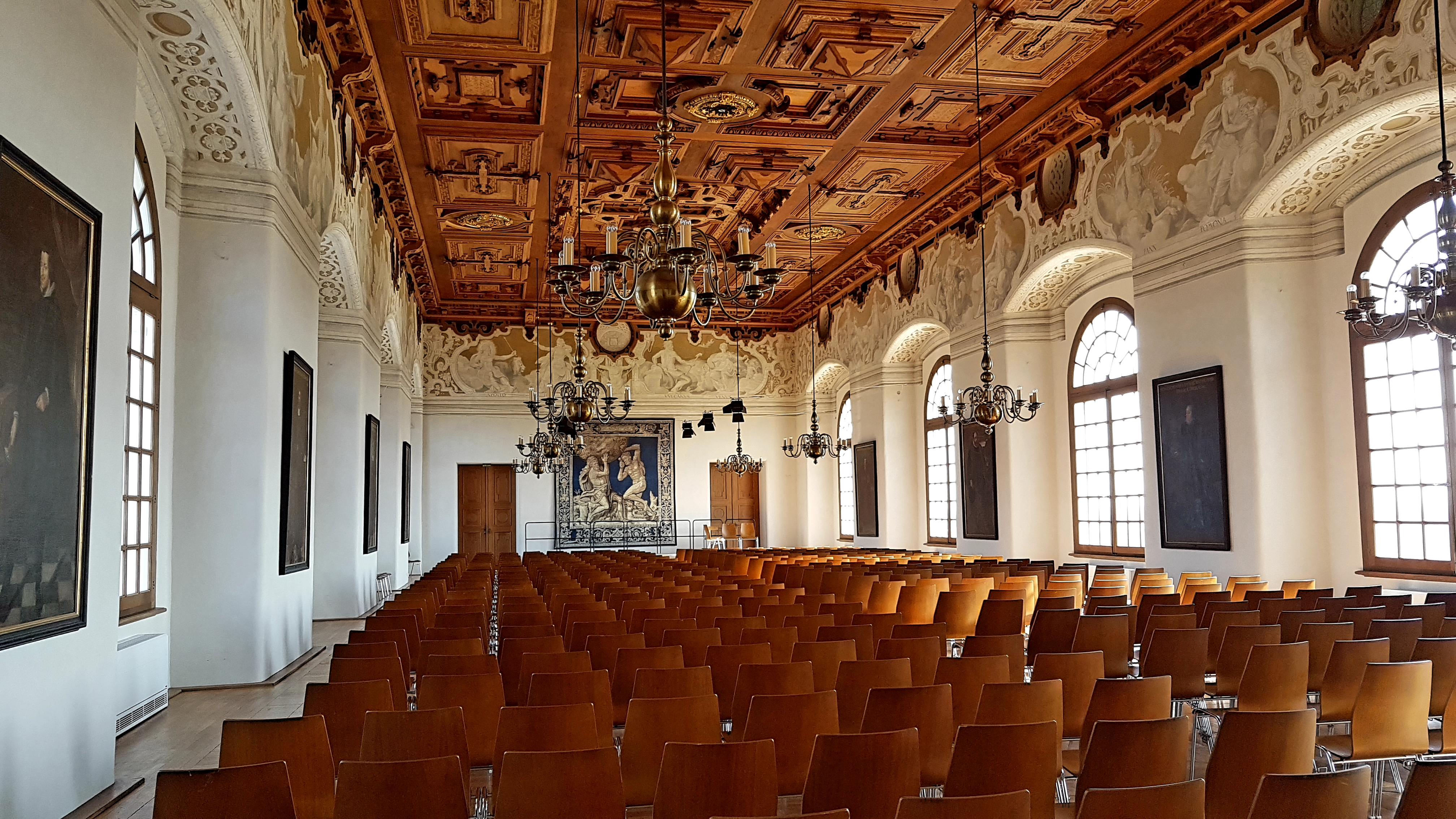 Schloss Dachau, ehemaliger Hochrenaissance-Festsaal der 1715ff durch Joseph Effner verändert wurde, mit originaler Kasettendecke von 1566ff.